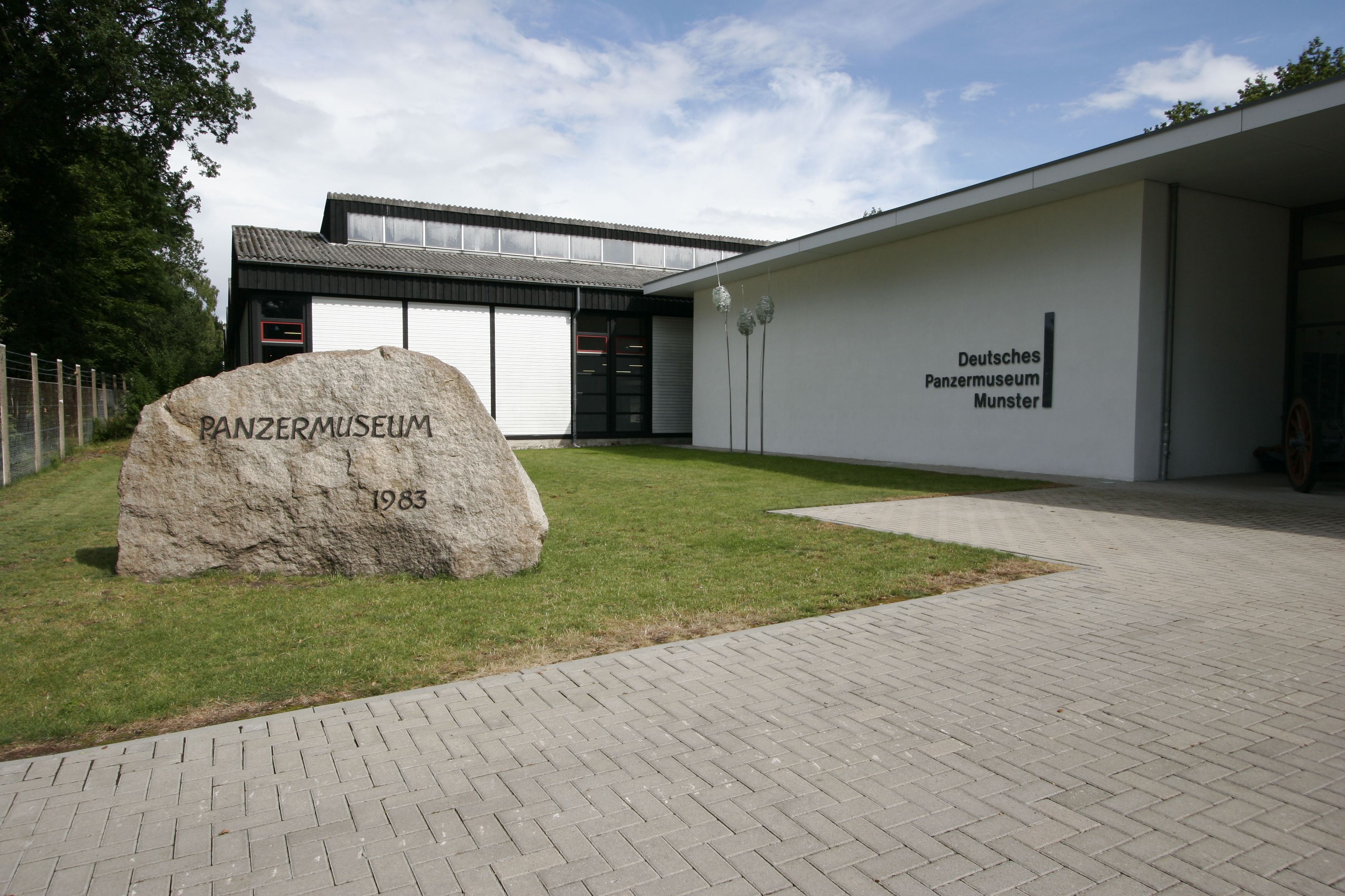 Deutsches Panzermuseum Munster , Germany."Entrance"